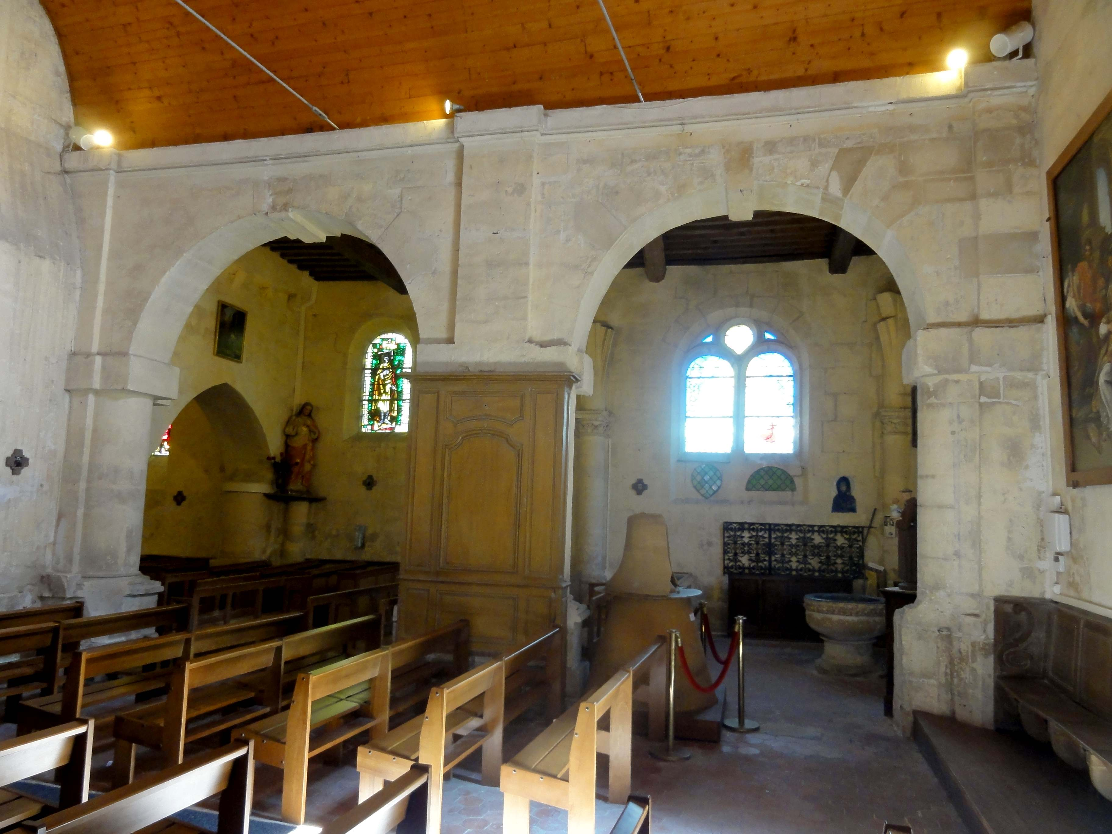 Nef, vue vers le sud.